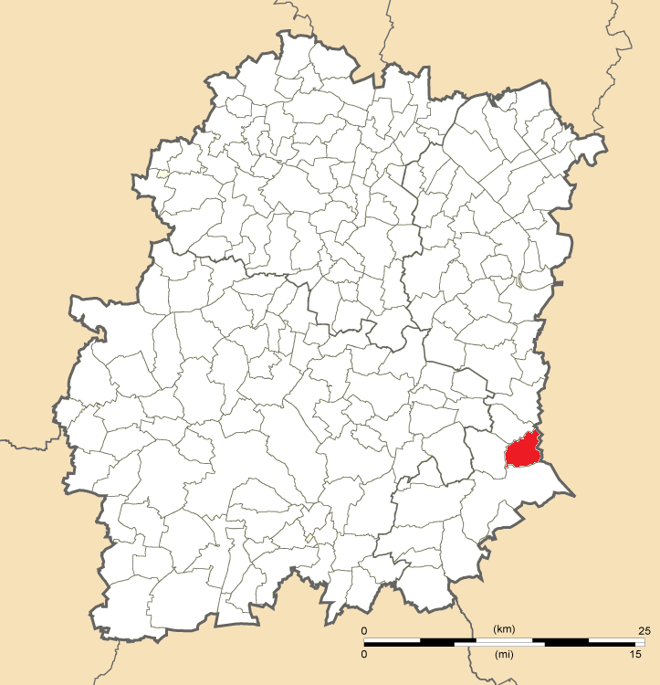 Carte de position de Courances en Essonne (91)